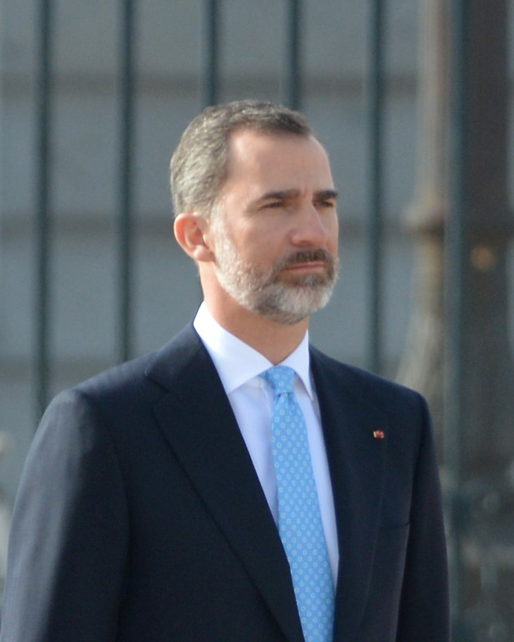 Felipe VI en febrero de 2017.